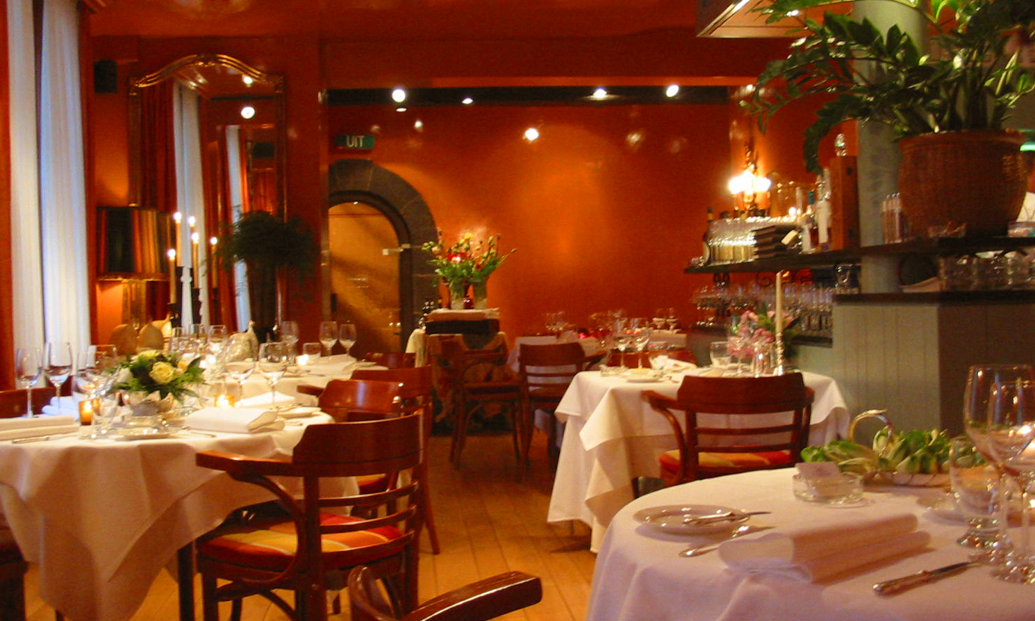 Restaurant Toine Hermsen, interieur